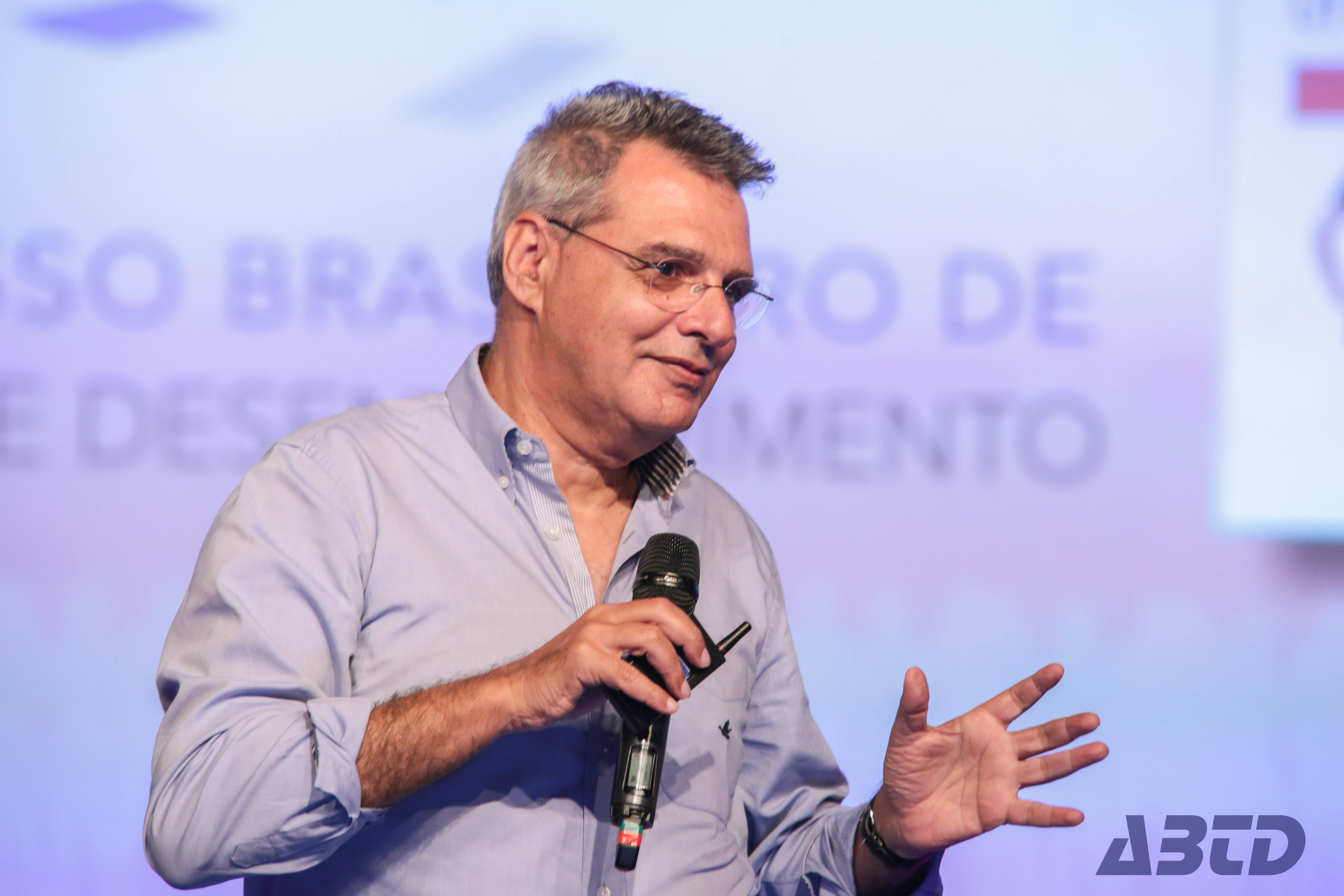 O jornalista Gilberto Dimenstein durante palestra no Congresso de Treinamento e Desenvolvimento da América Latina da Associação Brasileira de Treinamento e Desenvolvimento.